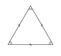 Triangle équilatéral est un triangle qui a trois cotés de même longueur.